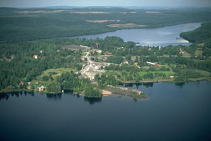 Motiv: Långban Nyckelord: Byggnadsminnen, Flygbilder, Riksintressen Kategori: Bergslagsmiljö Långban